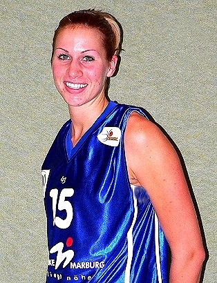 Lisa Koop, Basketballnationalspielerin